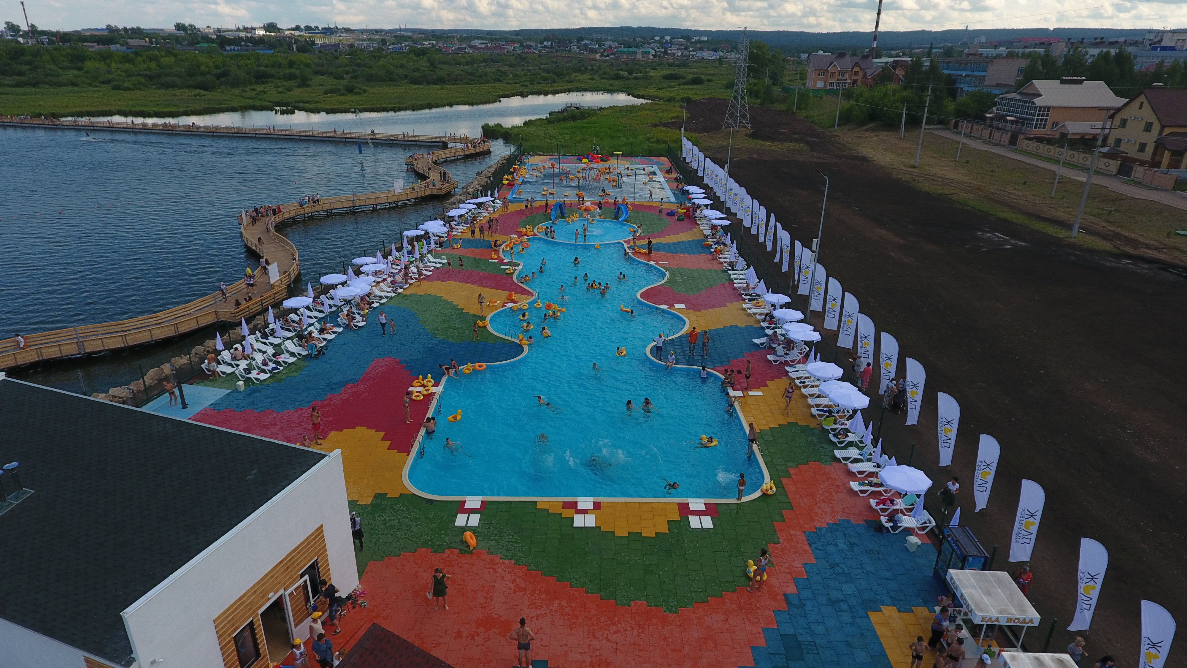 В рамках года водоохранных зон в Альметьевске открыт обновленный пляж